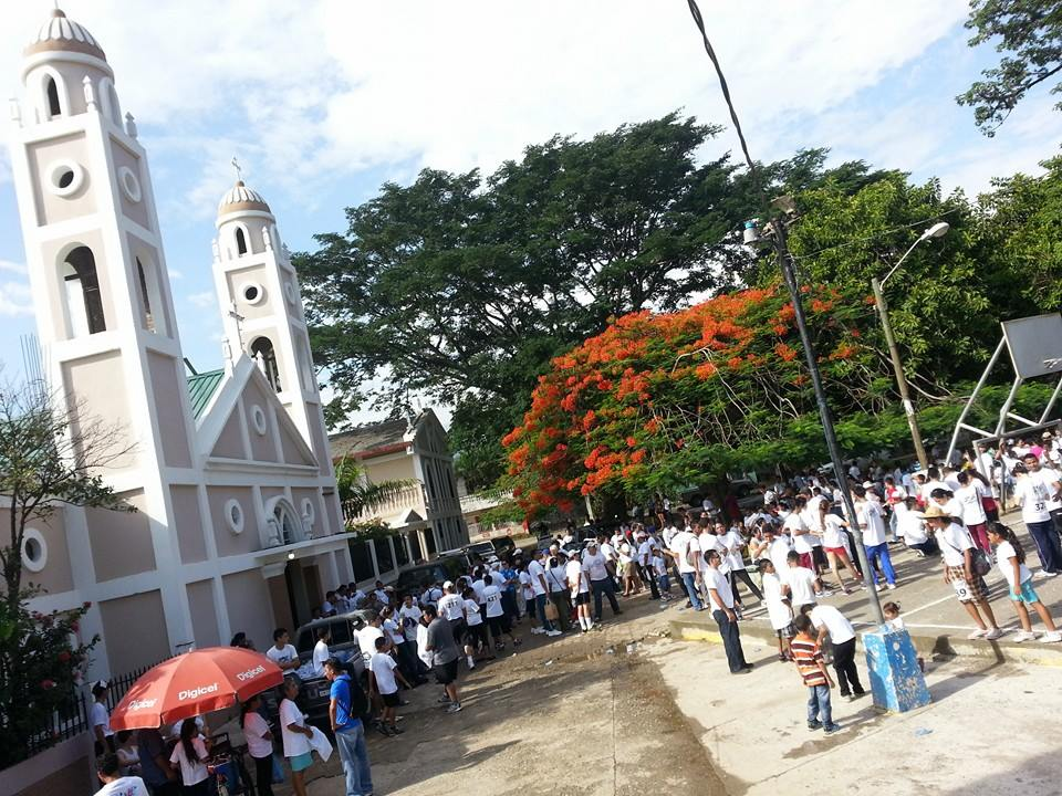 Iglesia Catolica Santa Ana Frente al Parque de Chamelecon